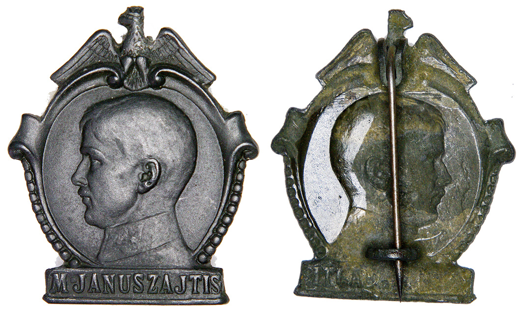 Пам'ятна патріотична відзнака на честь Маріуша Янушайтіса. Польща 1919-1939 рр.